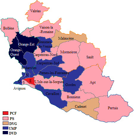 Couleurs politiques des cantons du département de Vaucluse